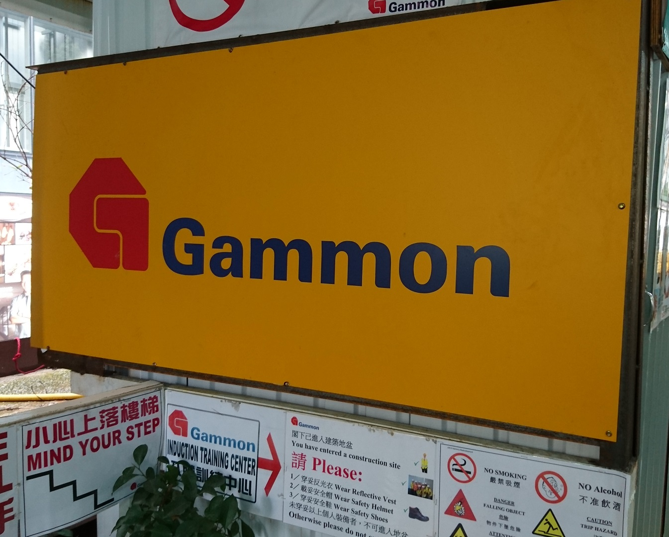 金門建築商標